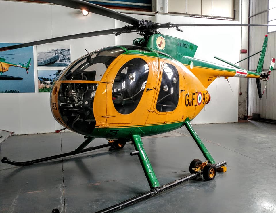 Agusta NH-500MC